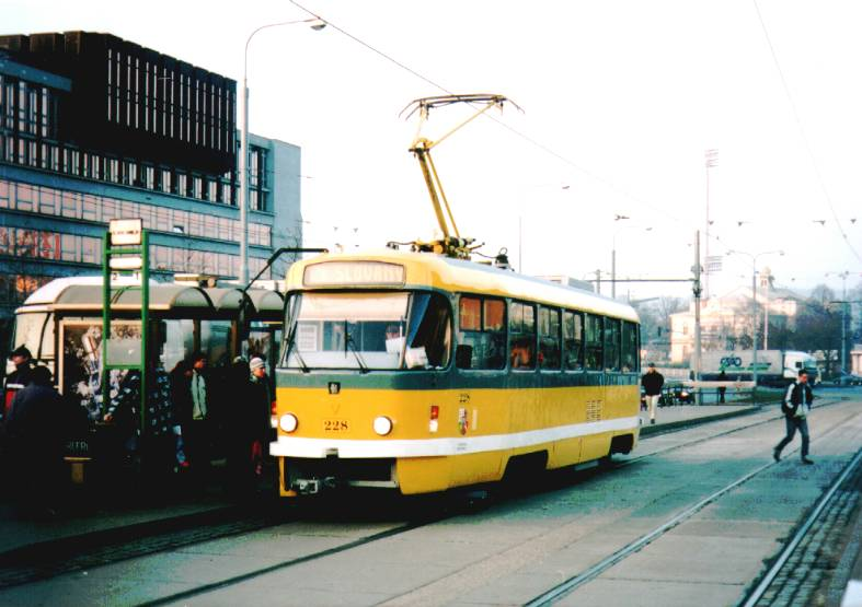 Tramvaj typu Tatra T3M.0 v Plzni